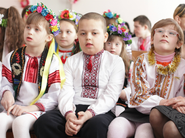 Свято першого дзвоника